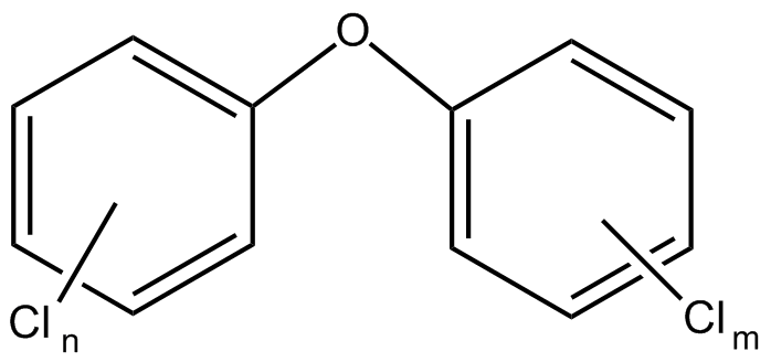 Èter difenílic policlorat on n+m és el número total de clors.